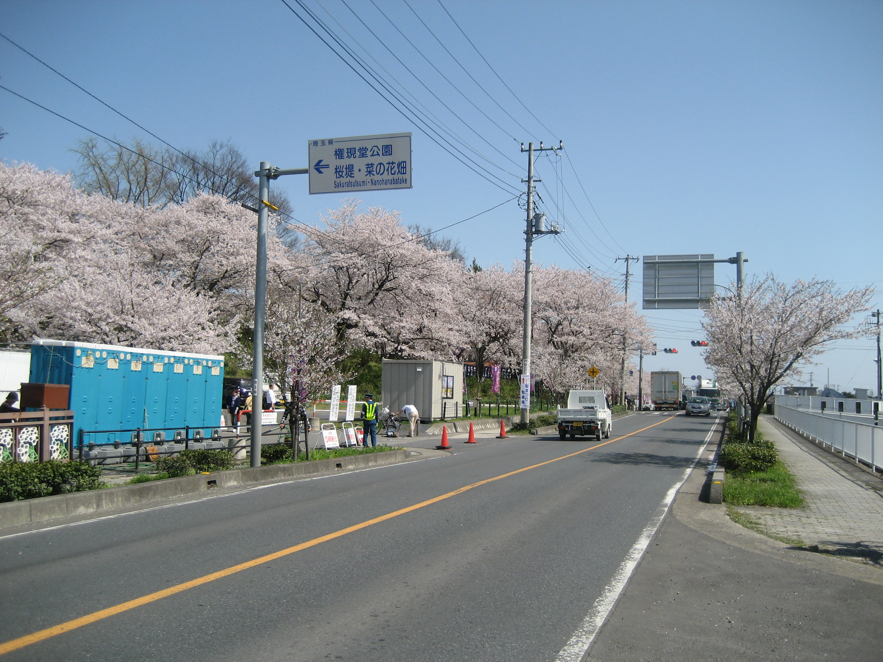 埼玉県道371号線幸手市権現堂付近